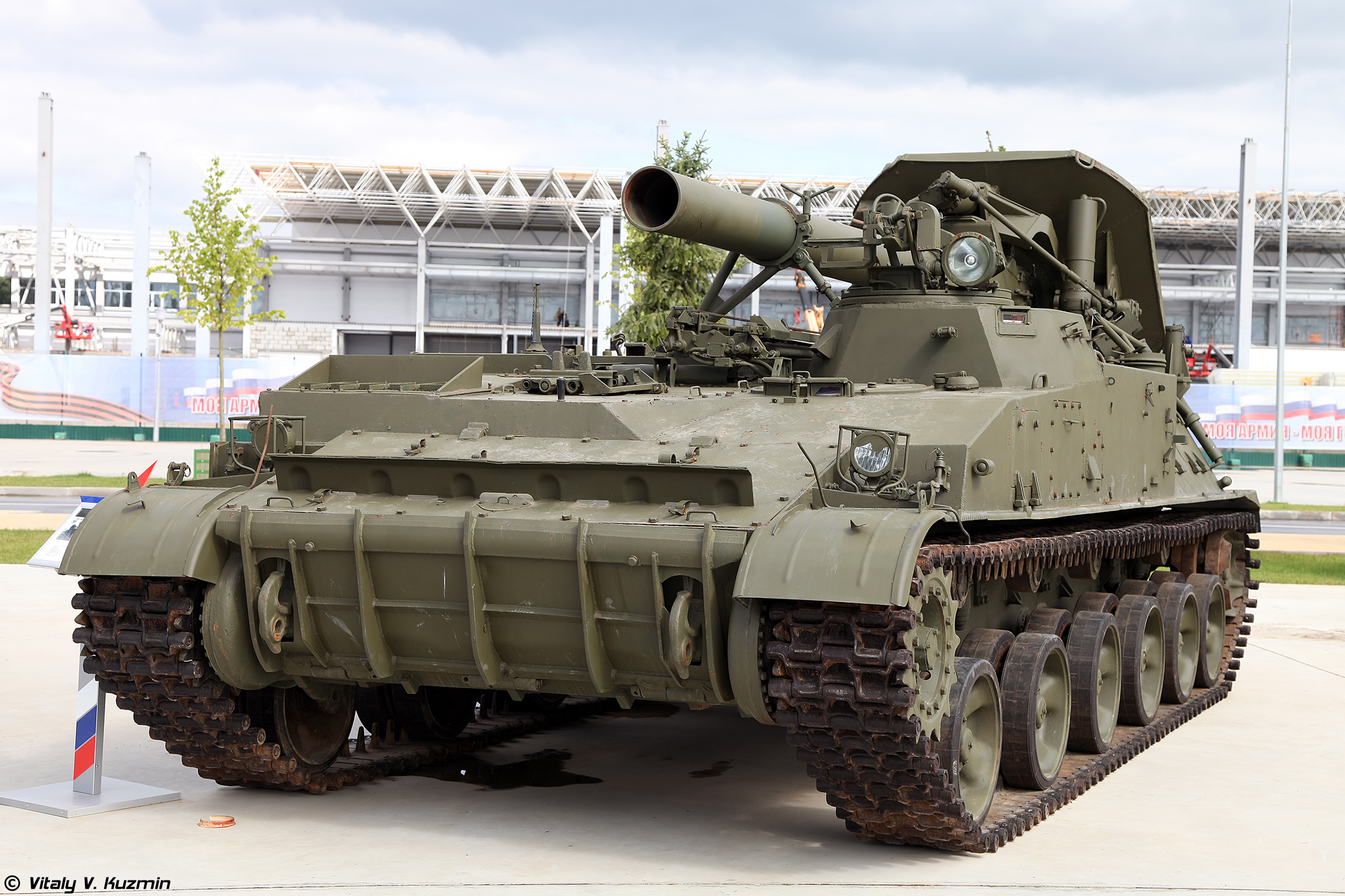 240-мм самоходный миномёт 2С4 Тюльпан (240mm self-propelled mortar 2S4 Tyulpan)